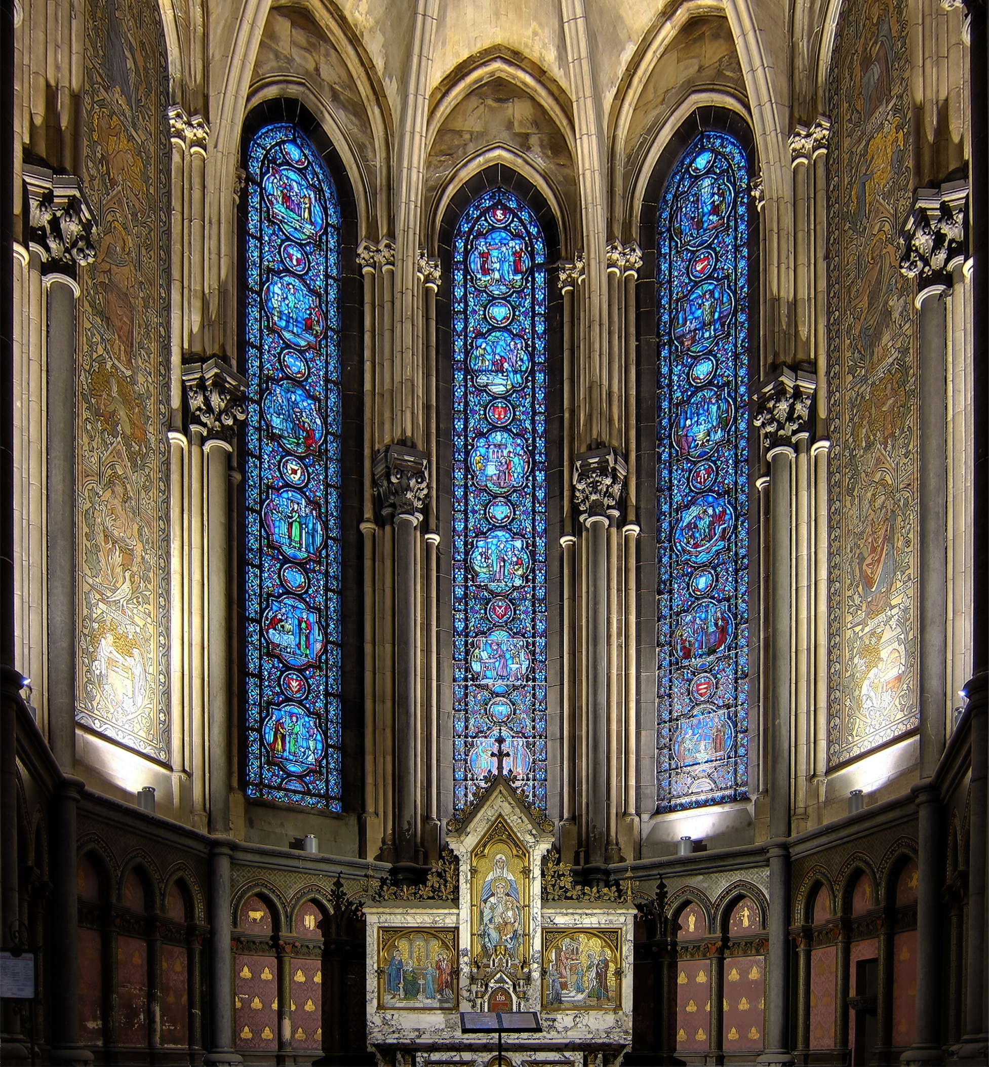 La chapelle Sainte-Anne dans la cathédrale Notre-Dame-de-la-Treille de Lille (Nord).